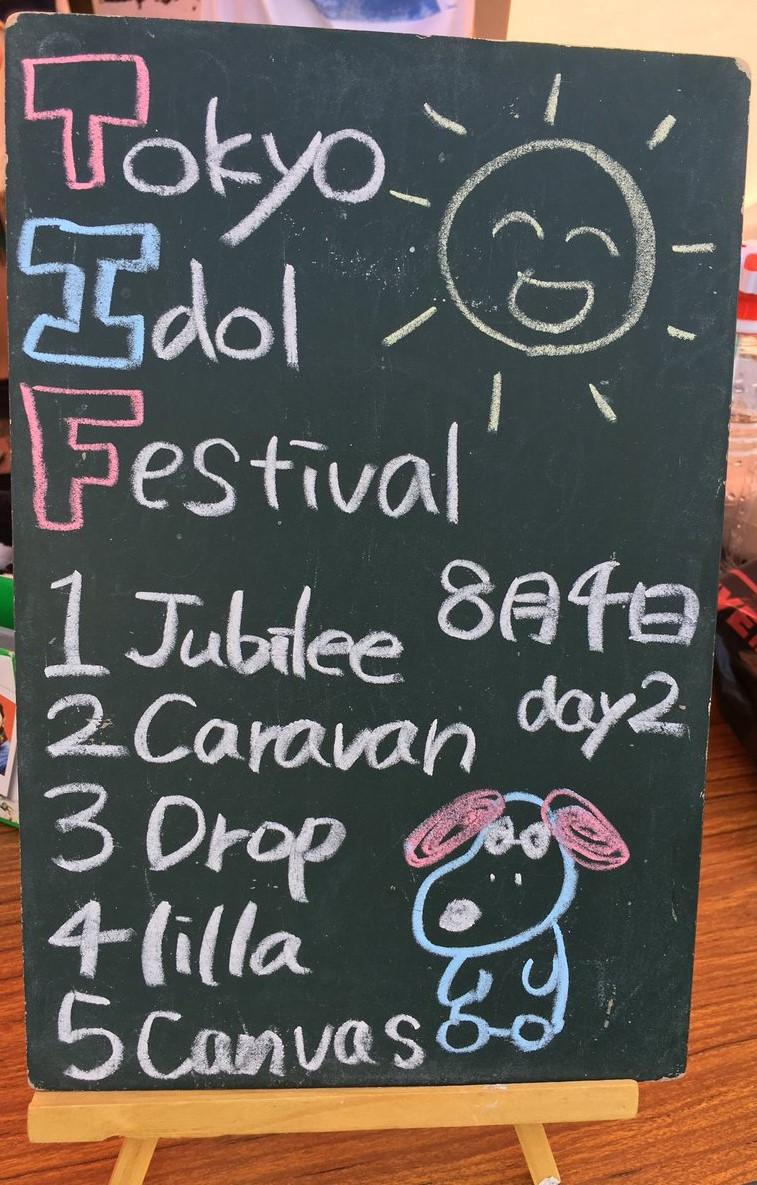 amiinAセトリボード(20180804(1))